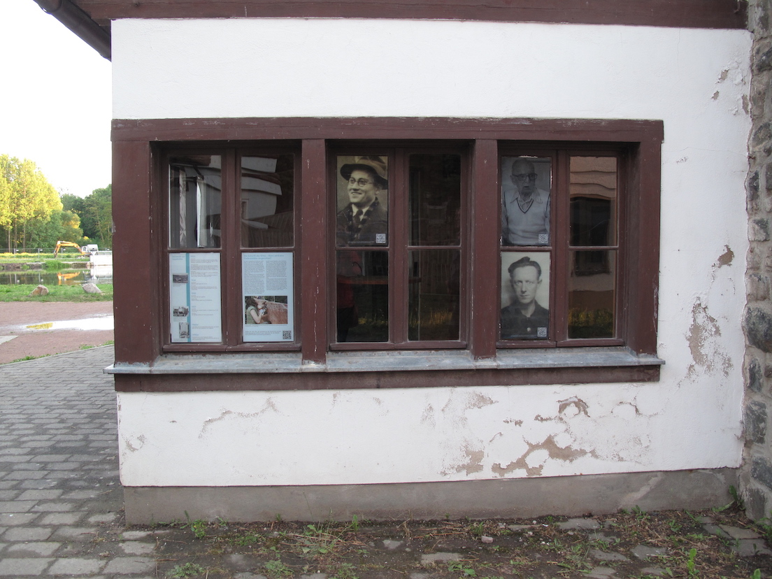 Die Außenraumausstellung wurde im Juni 2016 von der Initiative Klick eröffnet. Sie zeigt die Porträts ehemaliger Häftlinge und gibt einen kurzen Überblick über die Geschichte und die Nutzung des Geländes.